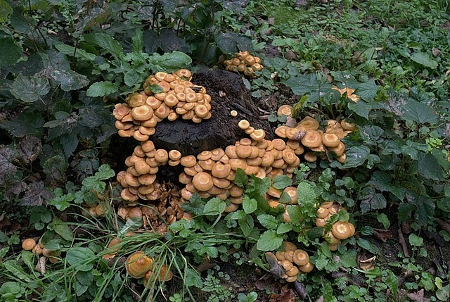 Фото путешествия по Беларуси.